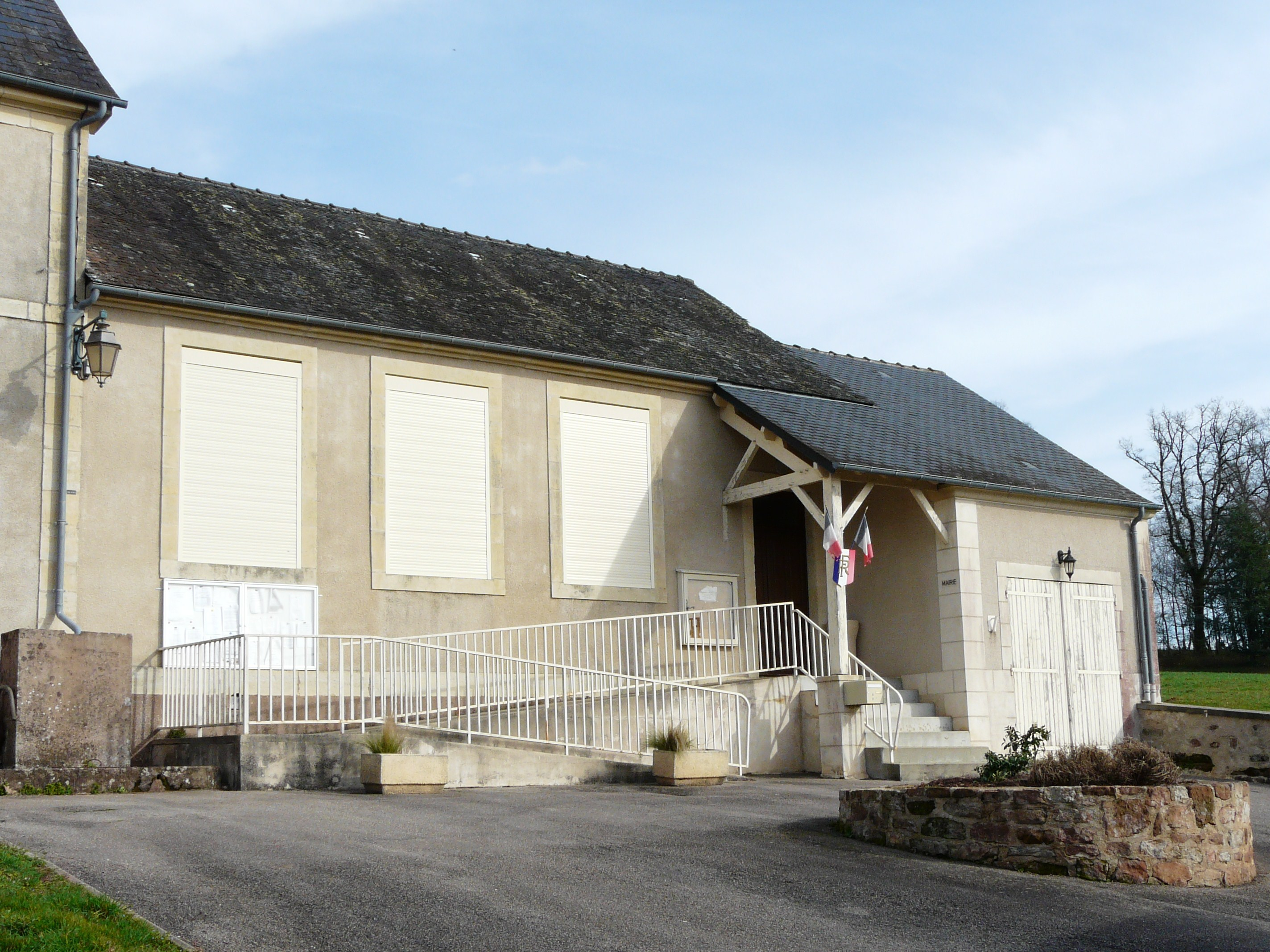 La mairie de Teillots, Dordogne, France.